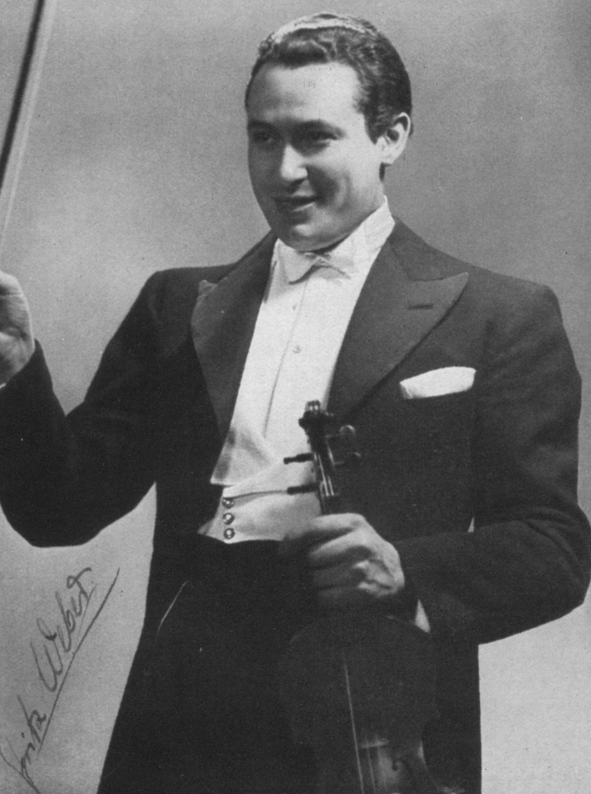 Fotoporträt von Fritz Weber, aufgenommen von Peter Weller (1868–1940)